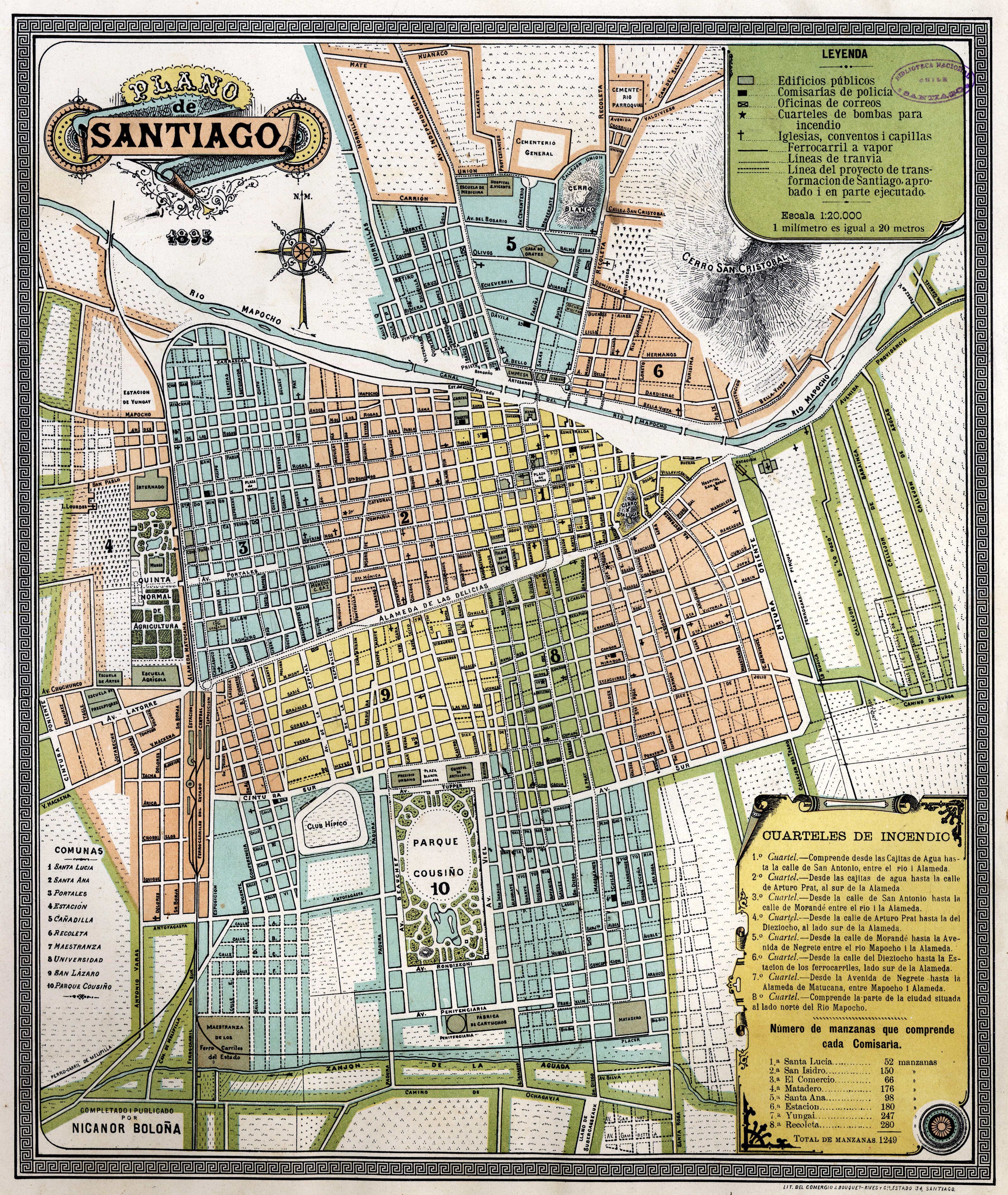 Plano de Santiago, 1895, del «Álbum de planos de la principales ciudades y puertos de Chile» publicados por Nicanor Boloña. [Santiago] : Dir. General de Obras Públicas, Of. de Geografía y Minas, 1896.